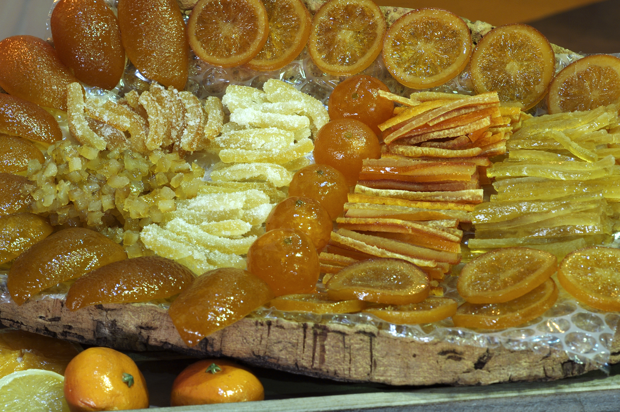 Fruits confits divers de Vaucluse